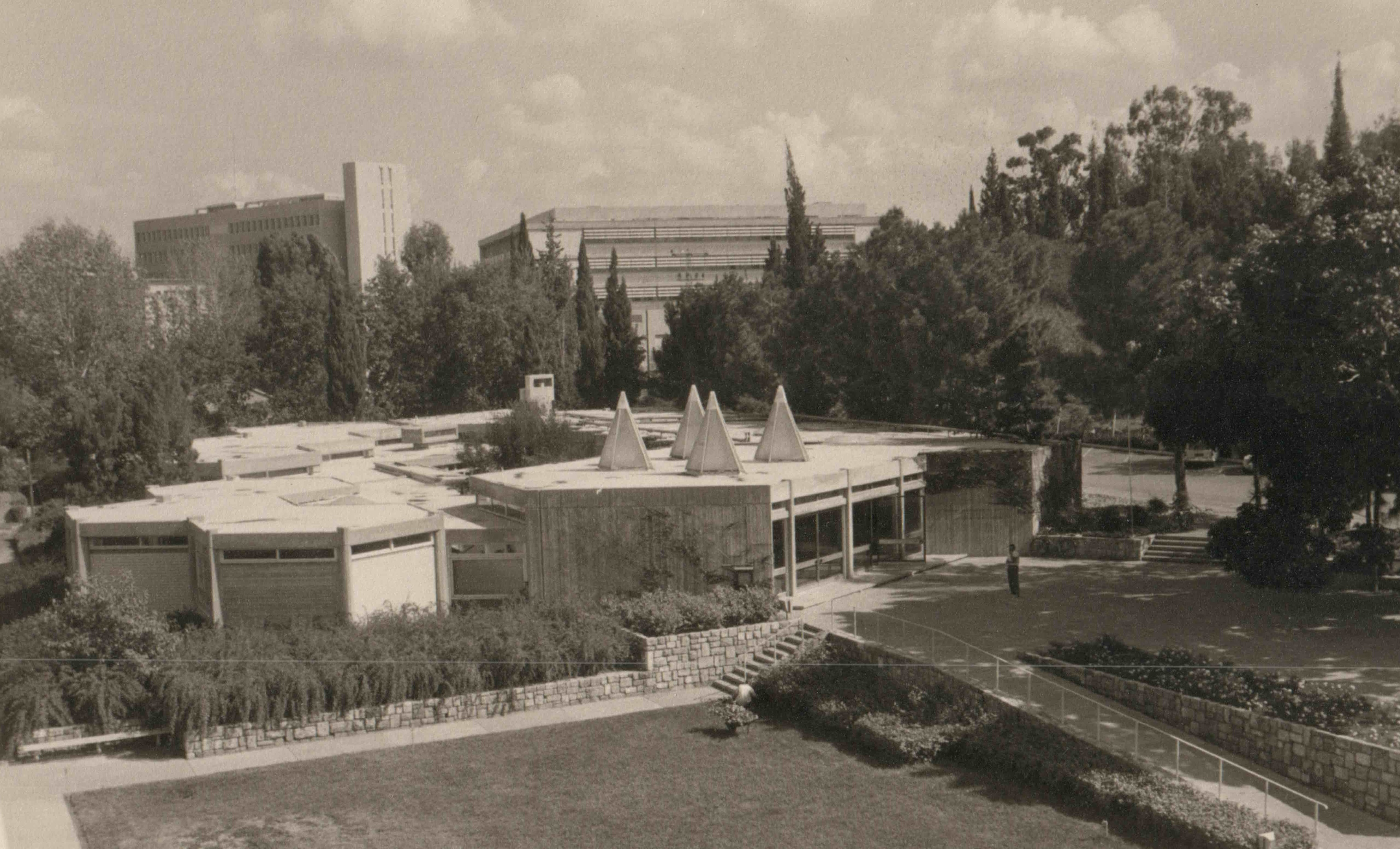 המרכז לחקר ההתישבות ברחובות עם פתיחתו ב- 1961